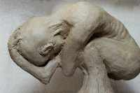 Bild eines Tonmodells einer Skulptur Bild und Skulptur erstellt durch Benutzer:Focus_mankind 2001